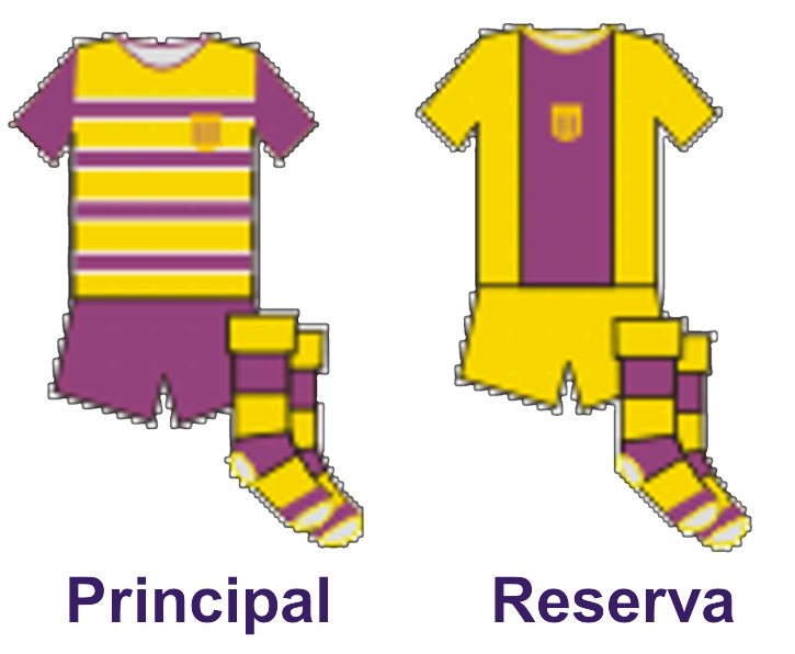 uniforme do melhor time do univer tabajara